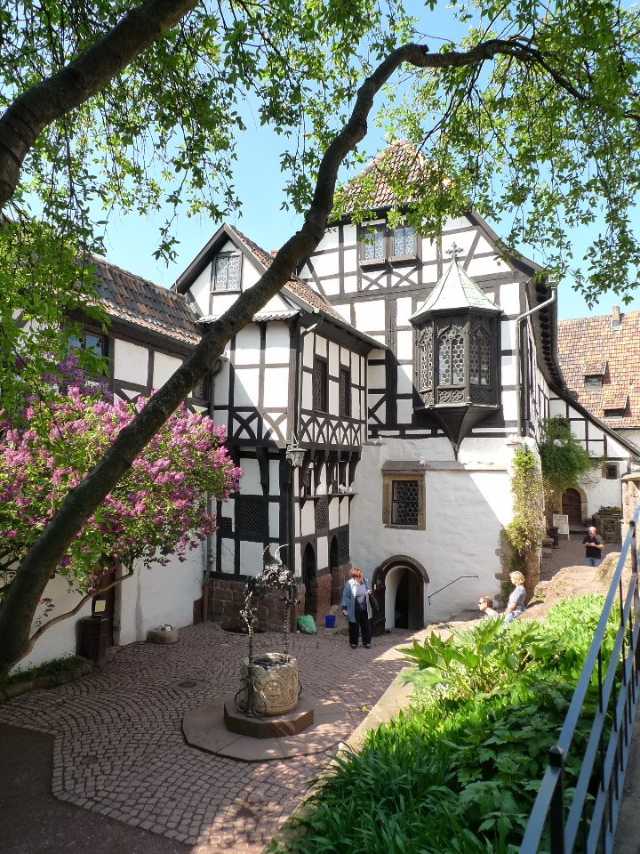 Wartburg - Erster Burghof